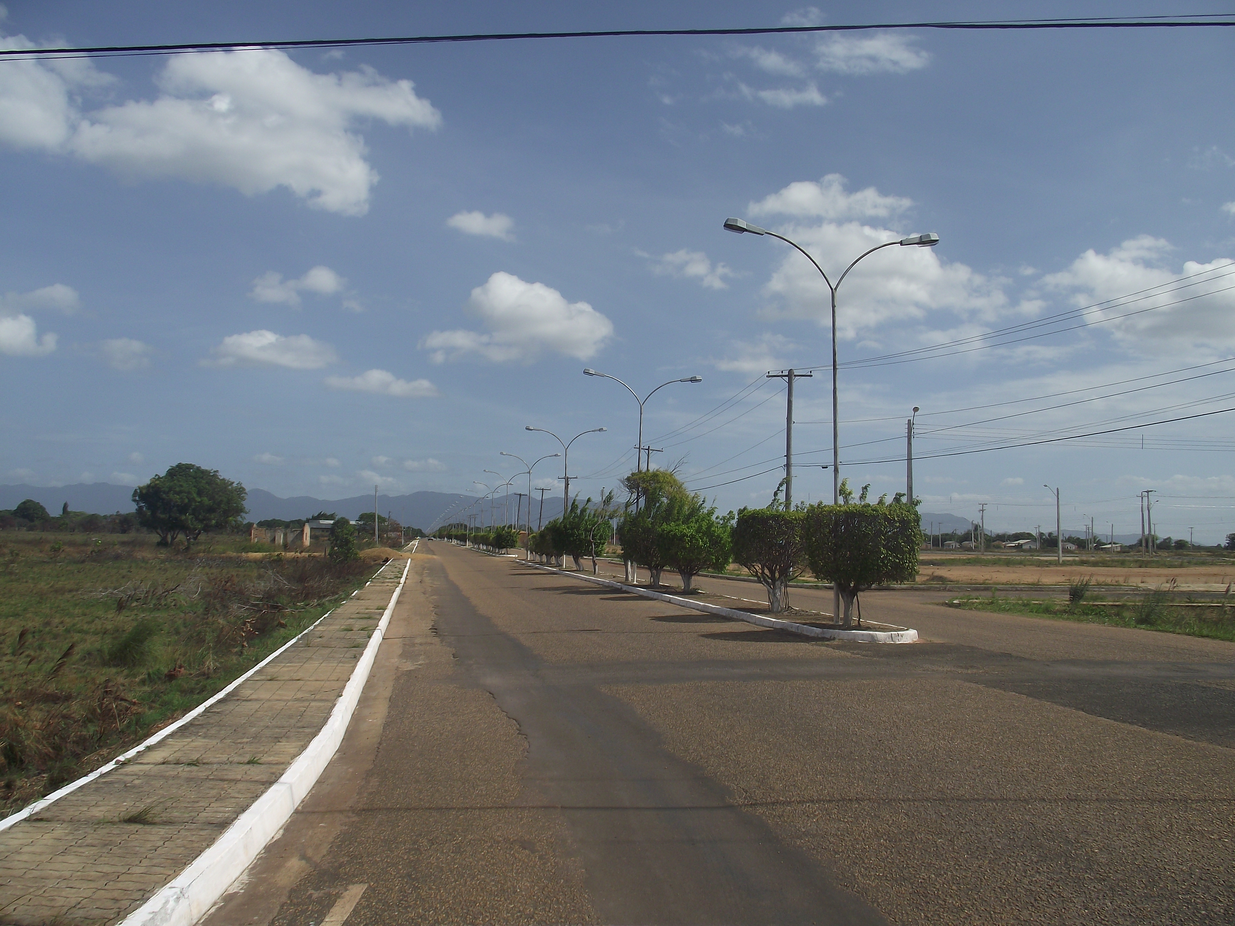 Bonfim city, Roraima, Brazil.